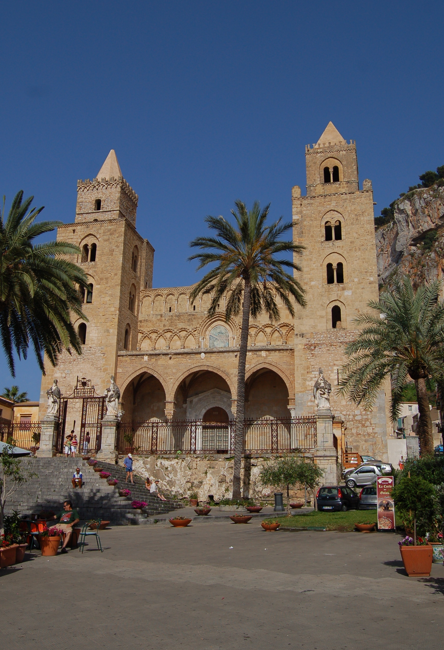 Cefalù (PA), ITA